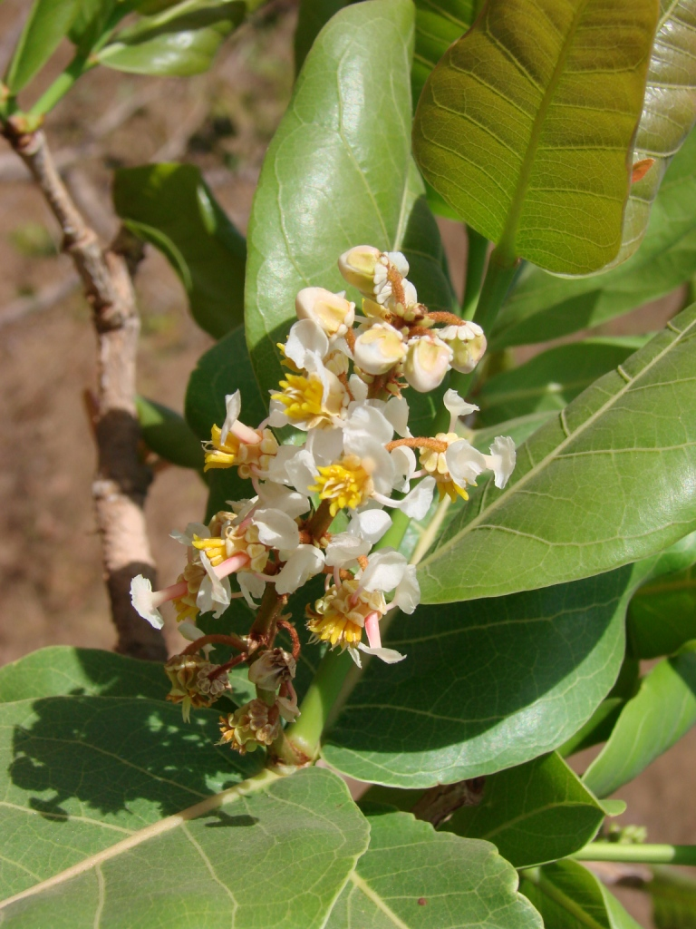 Byrsonima coccolobifolia Kunth - MALPIGHIACEAE - APA da Bacia do Rio São Bartolomeu - Brasília - Distrito Federal - Brasil.